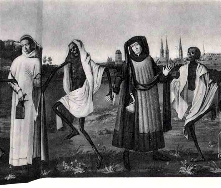 Totentanz Bild 4/9